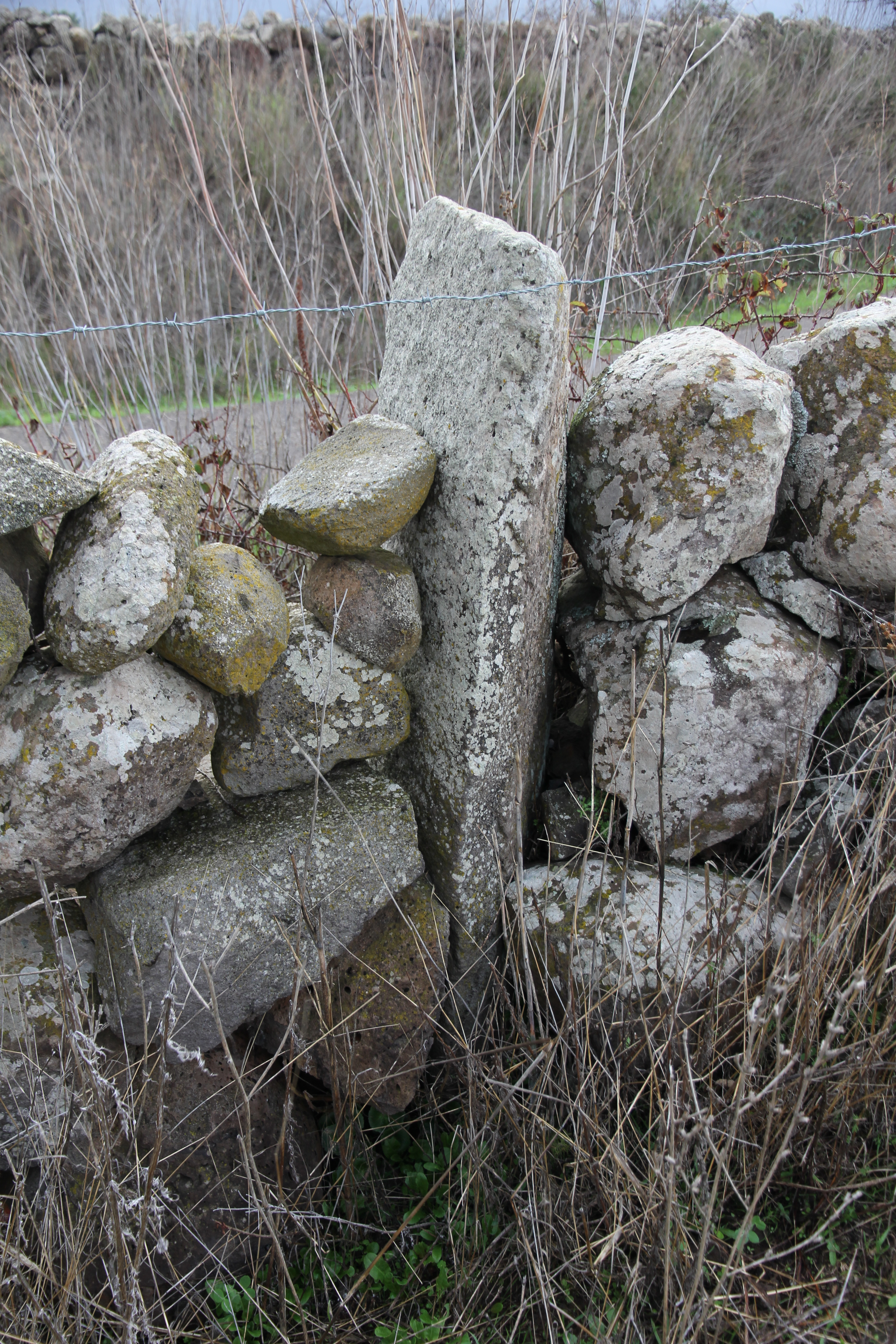 Menhir di Busola